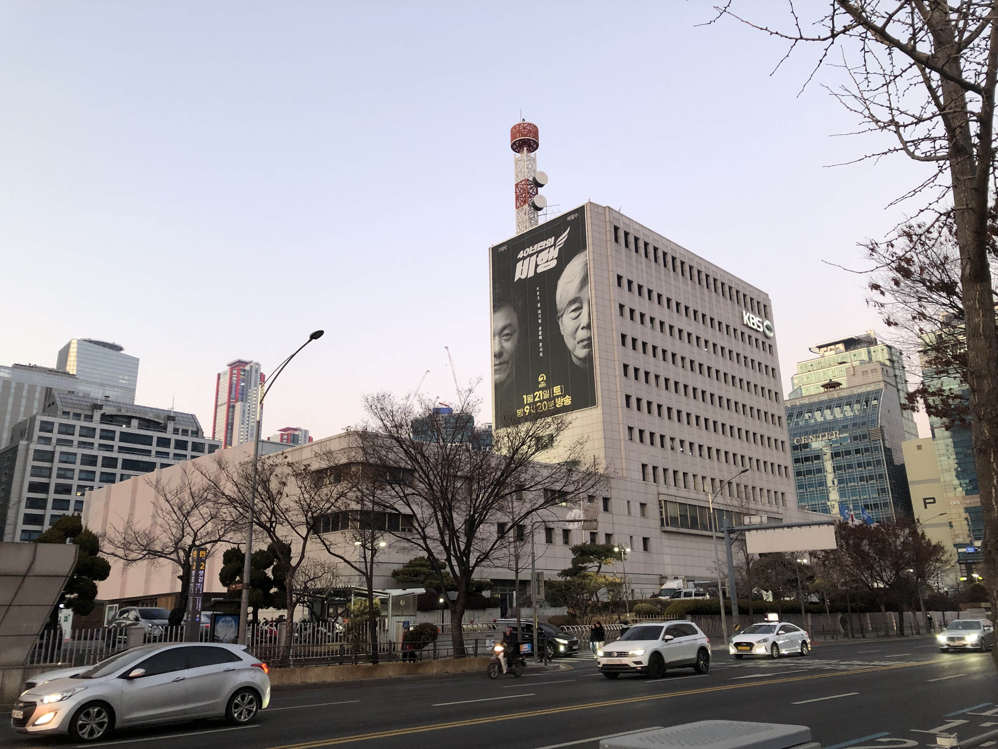 2006년에 제가 직접 찍어서 네이버 카페에 올린 사진입니다.